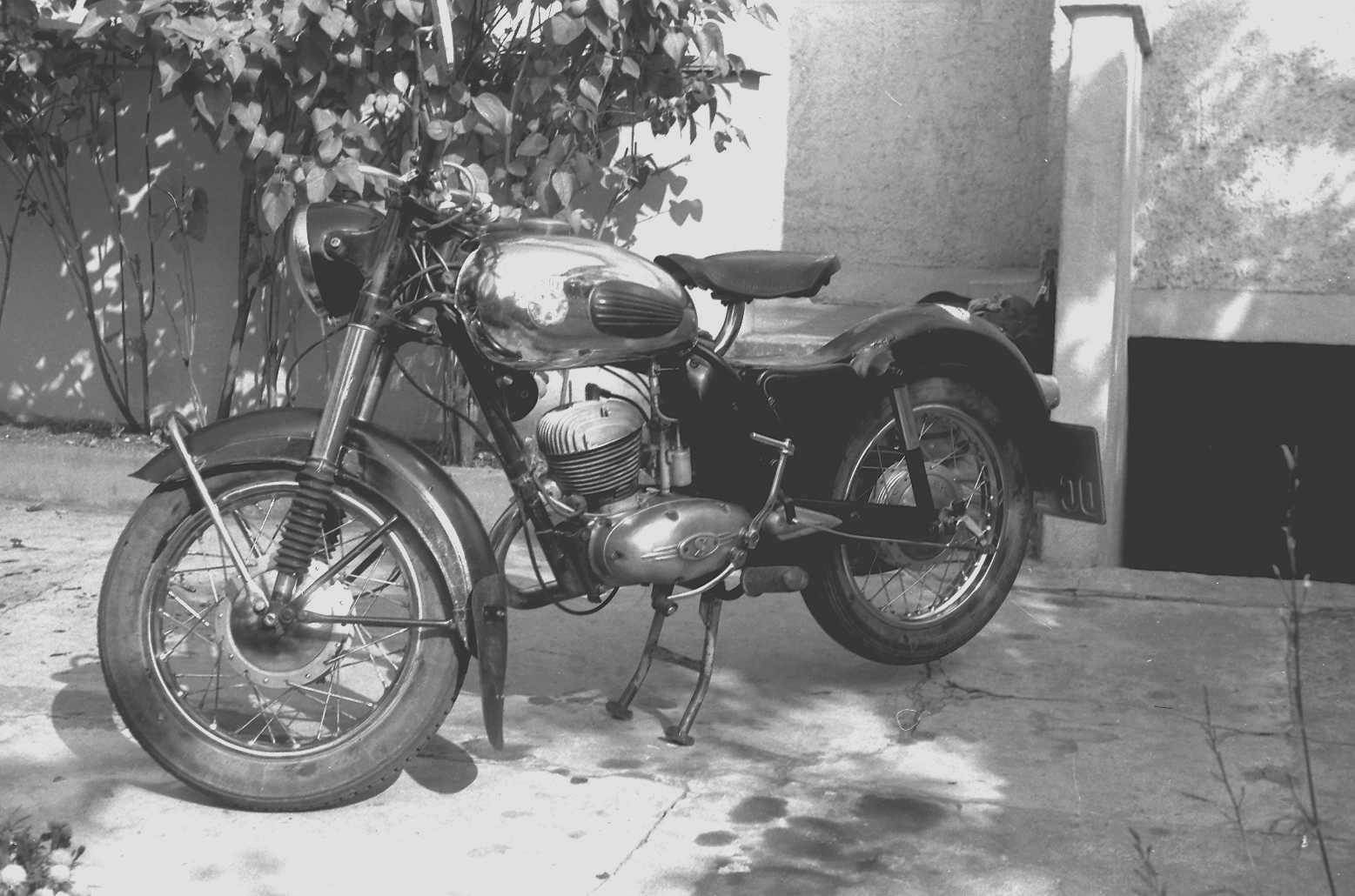 Mars-Motorrad mit 174 ccm-Motor von Fichtel & Sachs.jpg